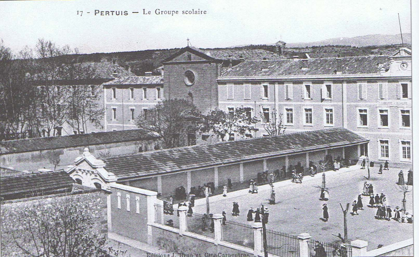 Groupe scolaire Pertuis en 1905